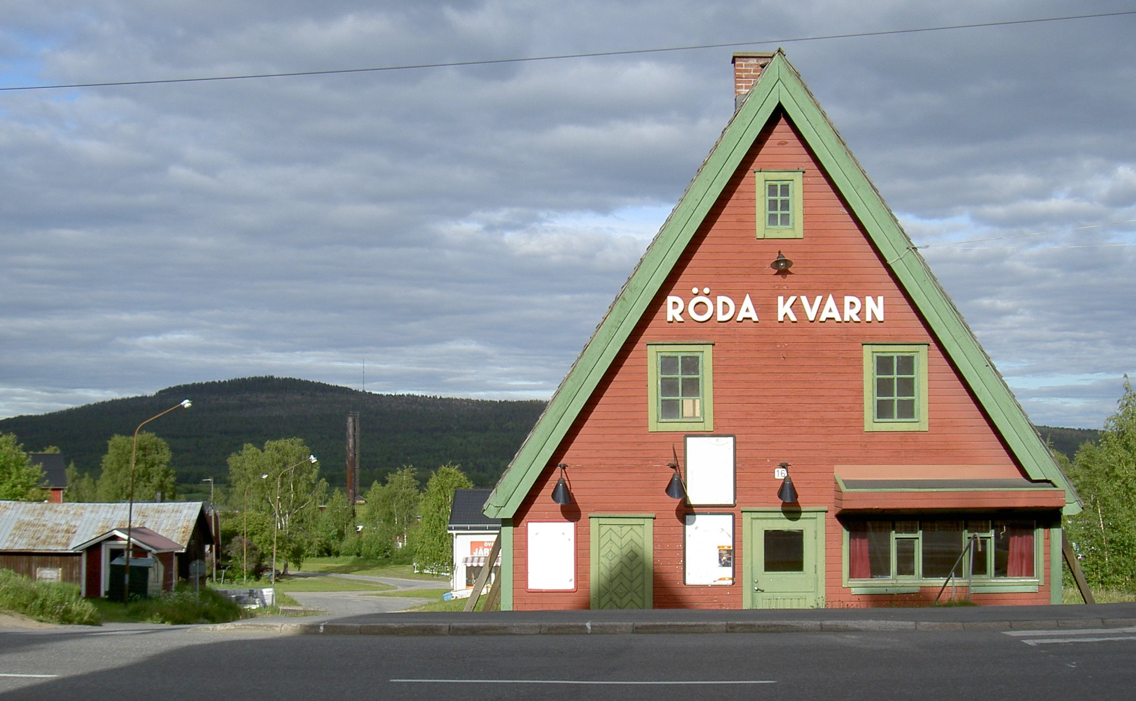 Röda kvarn, gammal biograf och nöjeslokal i centrala Övertorneå. Berget Aavasaksa i bakgrunden.